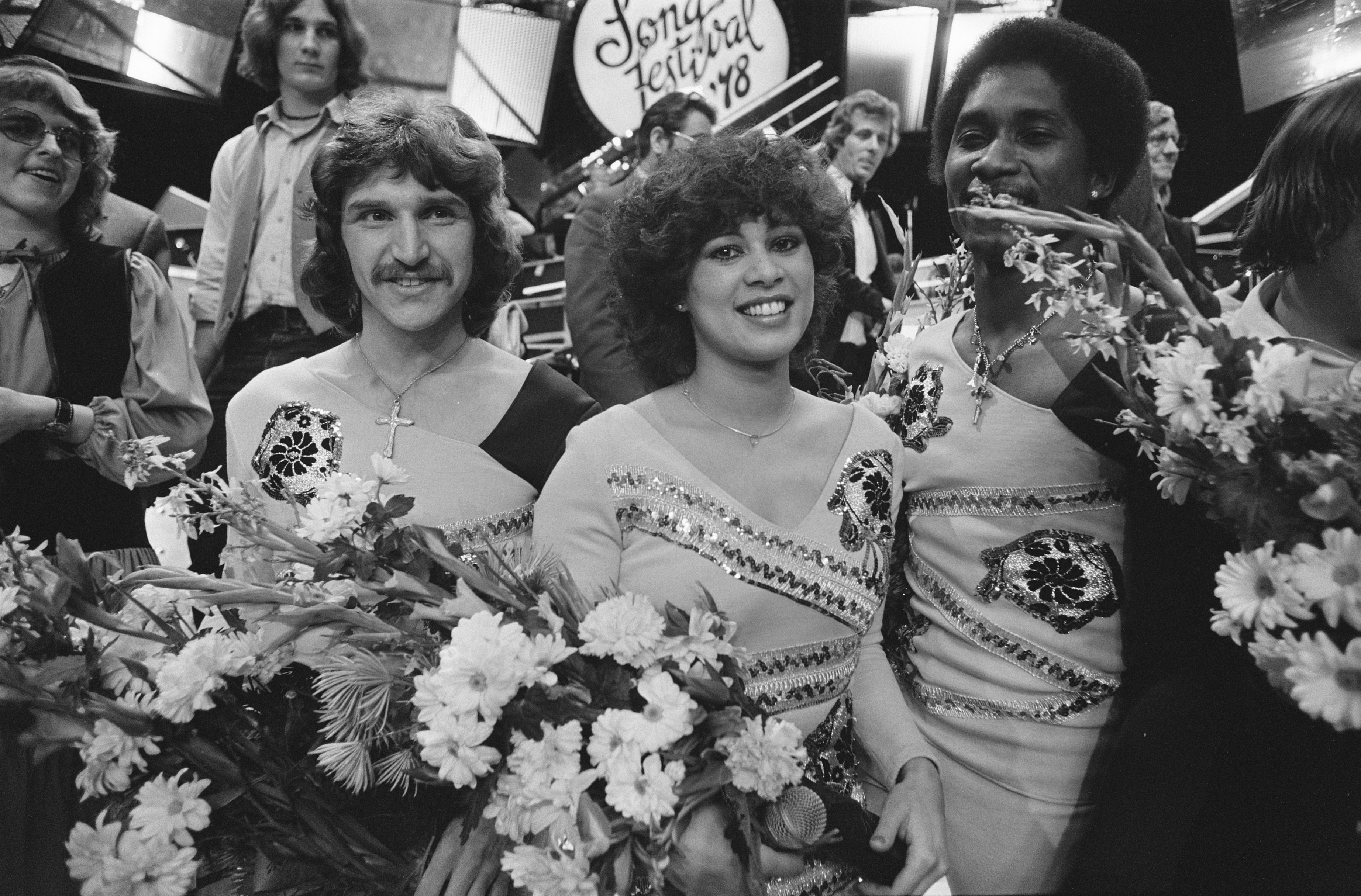 Collectie / Archief : Fotocollectie Anefo Reportage / Serie : [ onbekend ] Beschrijving : Nationaal Songfestival in Den Haag ; Harmony in de bloemen (close) Datum : 22 februari 1978 Locatie : Den Haag, Zuid-Holland Trefwoorden : BLOEMEN, songfestivals Persoonsnaam : Harmony Instellingsnaam : Nationaal Songfestival Fotograaf : Suyk, Koen / Anefo Auteursrechthebbende : Nationaal Archief Materiaalsoort : Negatief (zwart/wit) Nummer archiefinventaris : bekijk toegang 2.24.01.05 Bestanddeelnummer : 929-5870